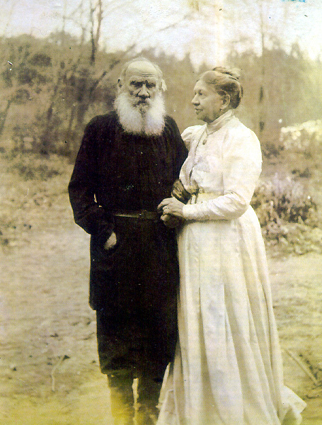 Л. Н. Толстой с женой в 48-ю годовщину свадьбы.